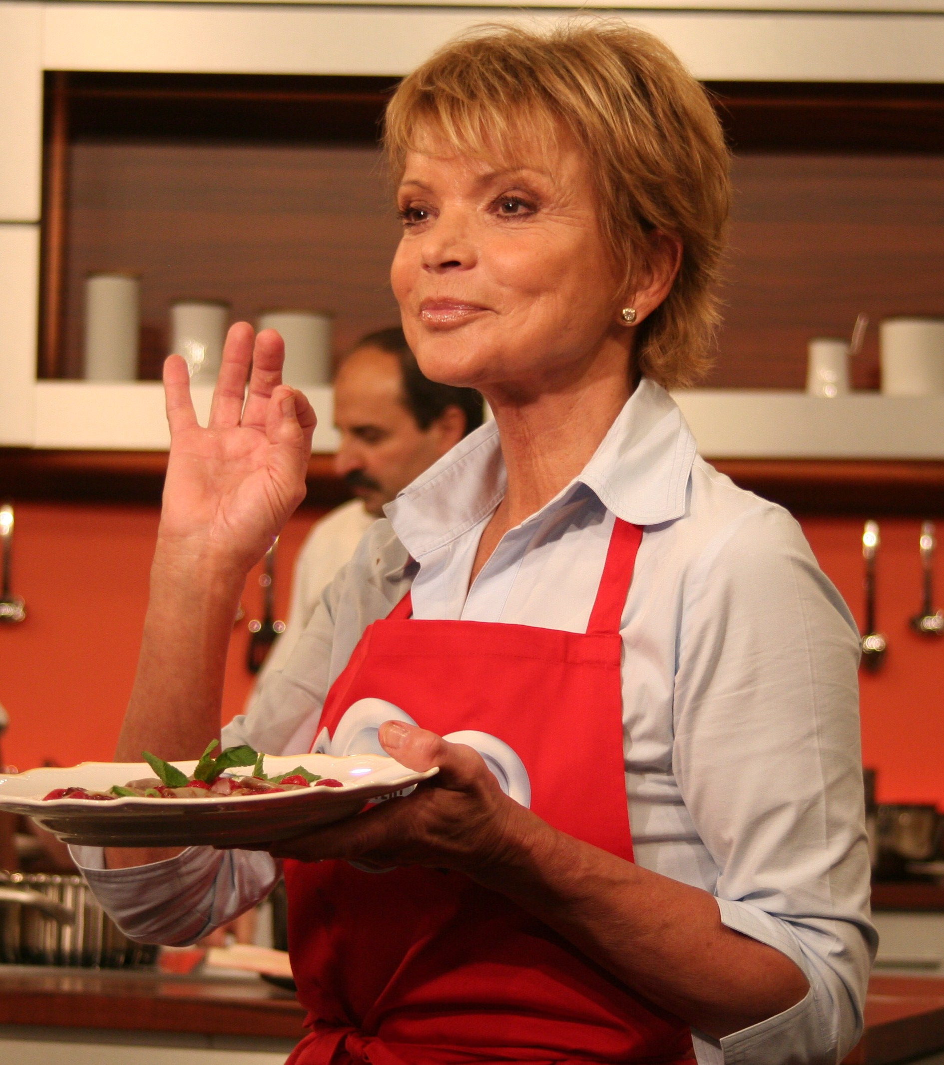 Uschi Glas bei der Aufzeichnung von Lafer! Lichter! Lecker!. Die Sendung kam am 1. Mai 2010 zur Ausstrahlung, Uschi Glas kochte an der Seite von Johan Lafer und serviert hier das Desert, ein Geeistes Rhabarbersüppchen mit warmen Schokotaschen.